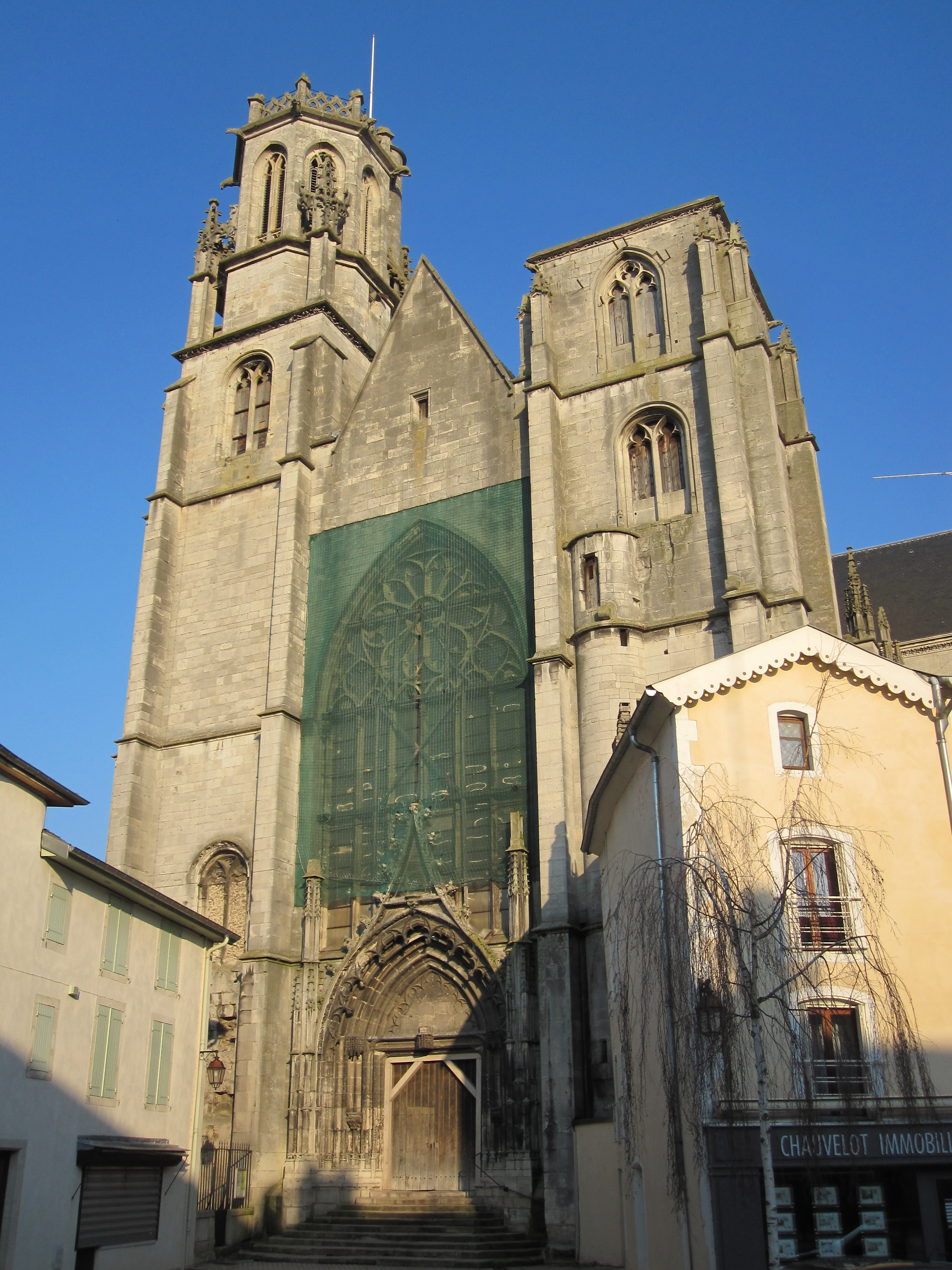 Façade de la collégiale Saint-Gengoult à Toul